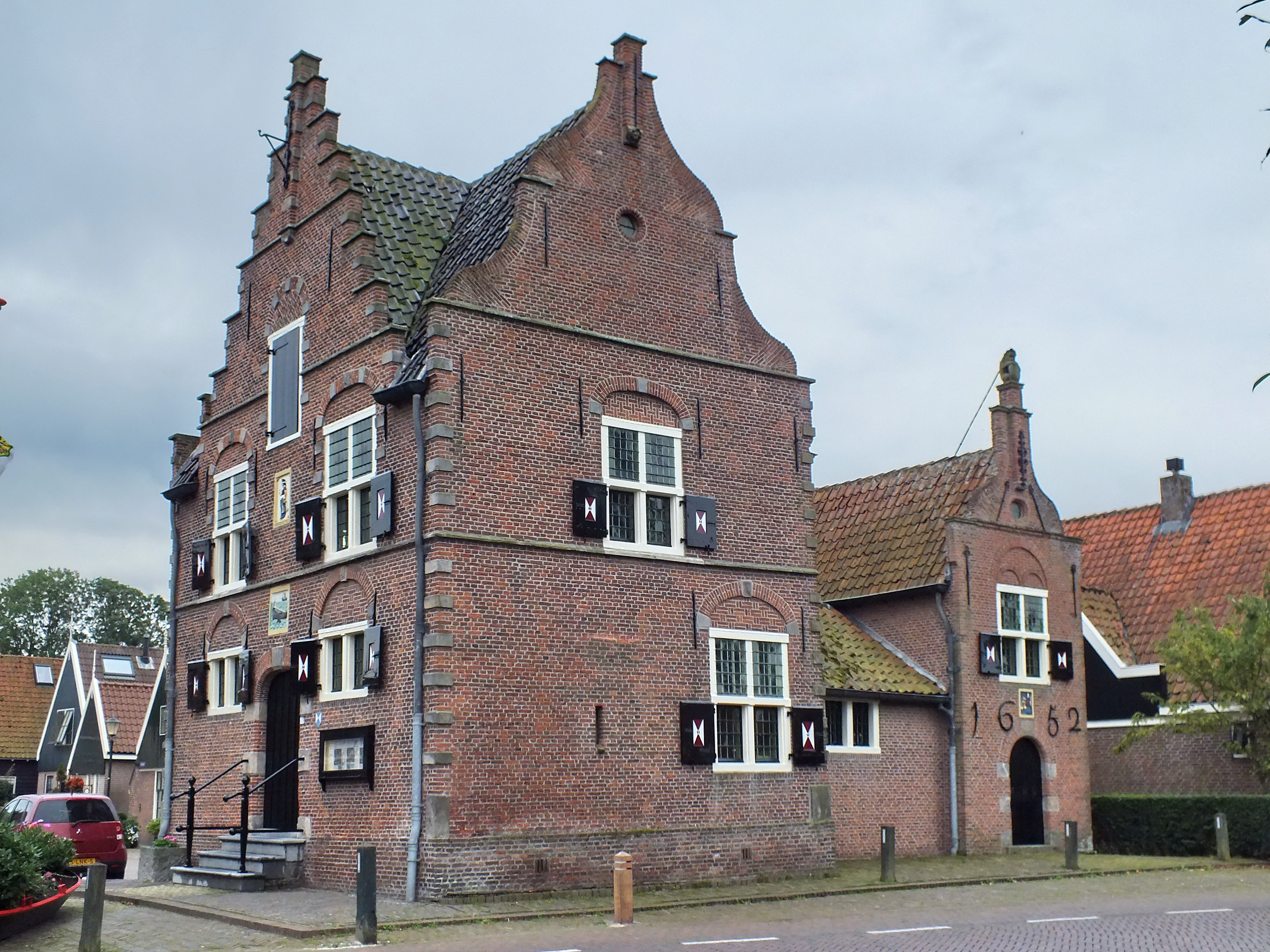 RAADHUIS. Gebouw uit 1639 met twee trapgevels en een in- en uitgezwenkte topgevel. Tegen de achterzijde het voormalige Rechthuis van Noordschermer, een gebouwtje uit 1652 met in-en uitgezwenkte voorgevel, hierheen overgebracht in 1938-'39.